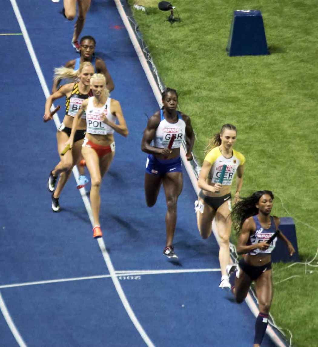 EKB42722 4x400m dames claes